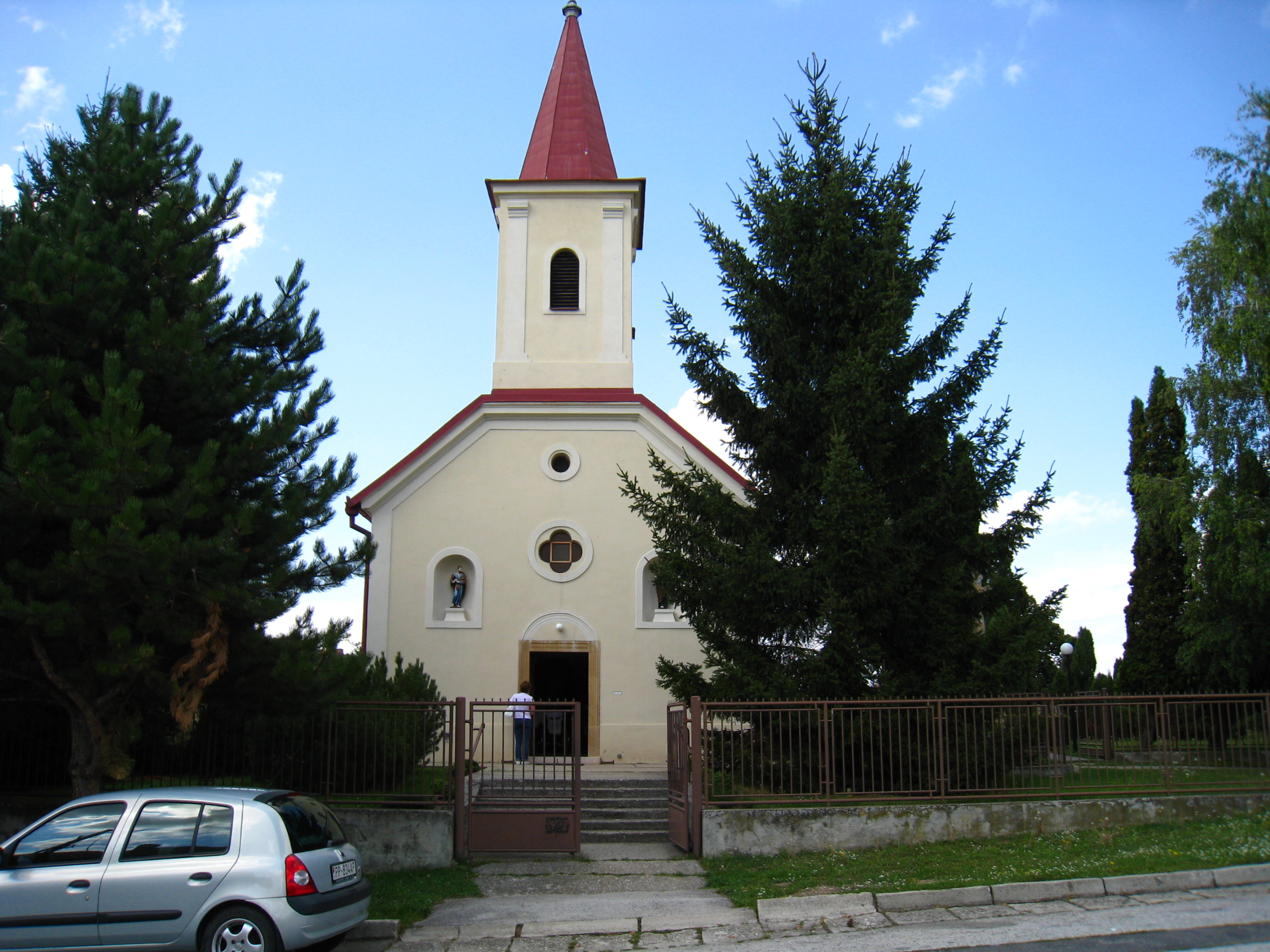 Kostol v Igrame